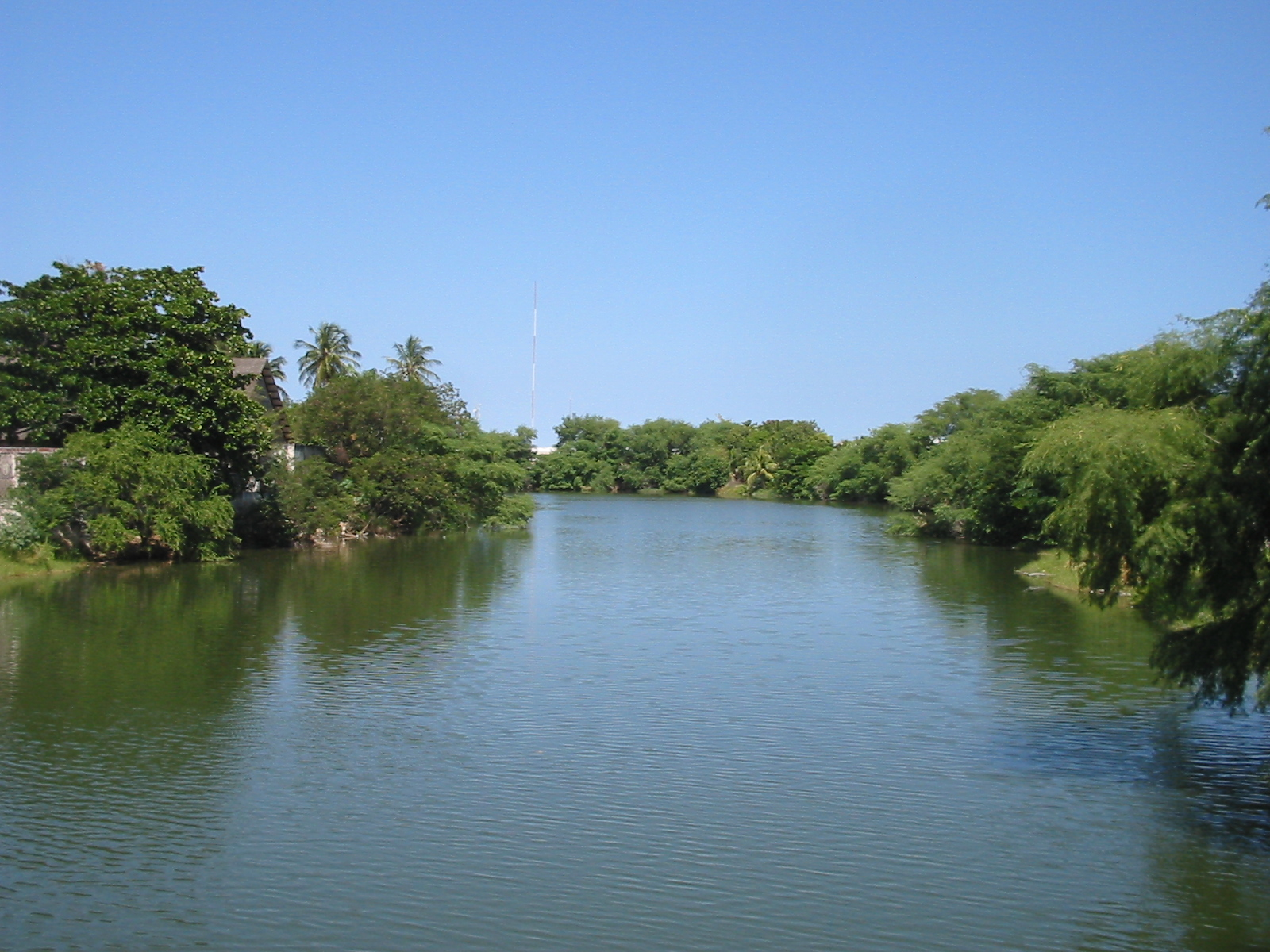 Mossoró (Rio Grande do Norte), Brasil. Rio Mossoró. Mossoró river. Mossoró (Rio Grande do Norte), Brazil.